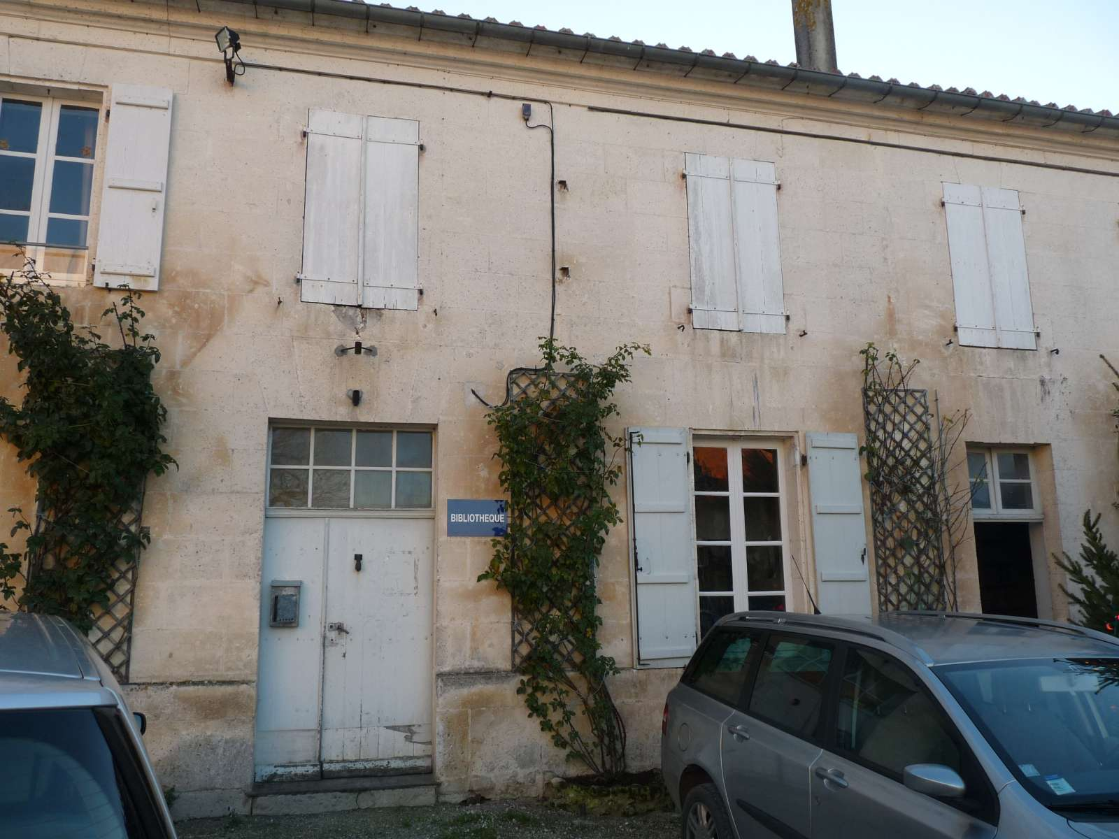 la bibliothèque et l'école (à droite); Pérignac, Charente, France